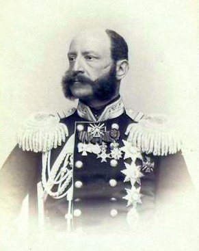 Сайн-Витгенштейн-Берлебург, Эмилий-Карл Людвигович